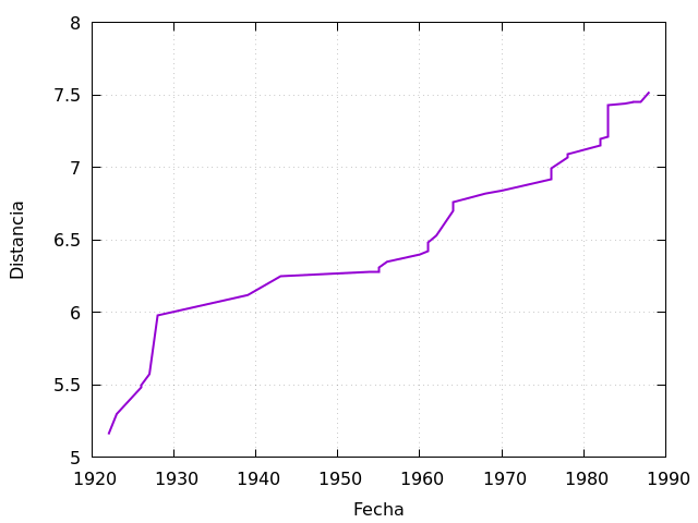 Este gráfico muestra la progresión del récord de salto femenino a lo largo de los años.